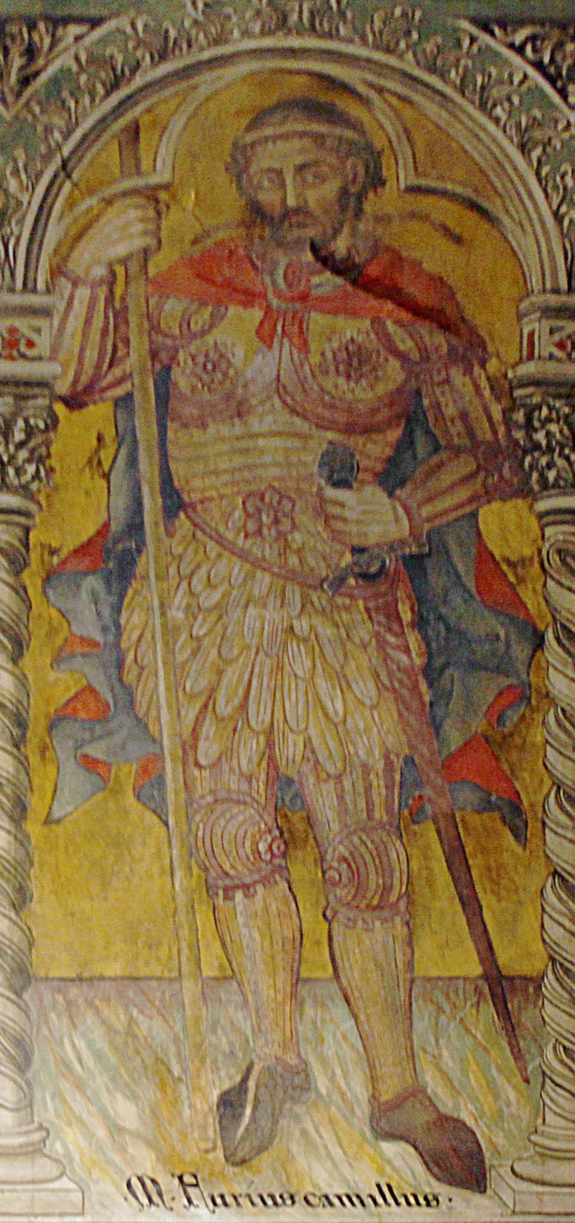 Palazzo Pubblico - Siena